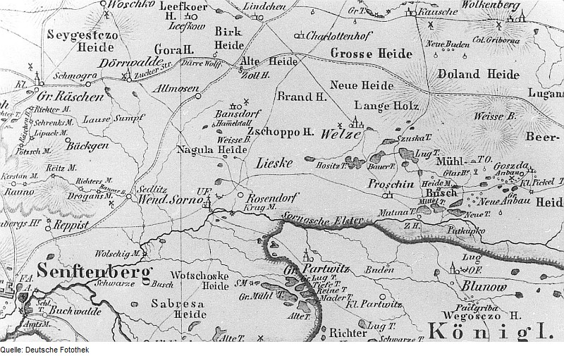 Original image description from the Deutsche Fotothek Wolkenberg. Geognostische Karte der Preußischen Oberlausitz, von Glocker, 1857 (Sign.: VII 65)